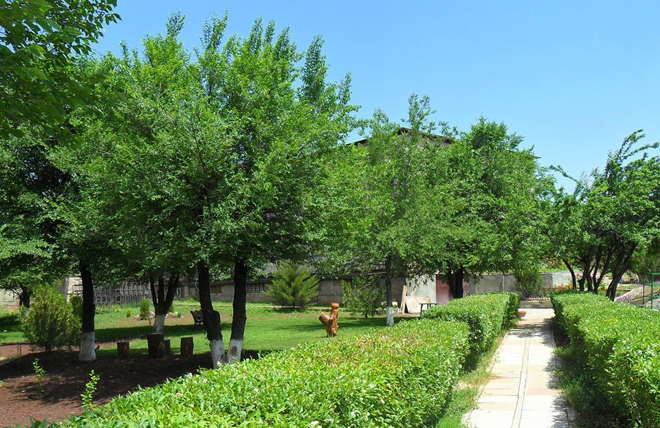 Հանրապետական գիտաբժշկական գրադարանի ամառային ընթերցարանը